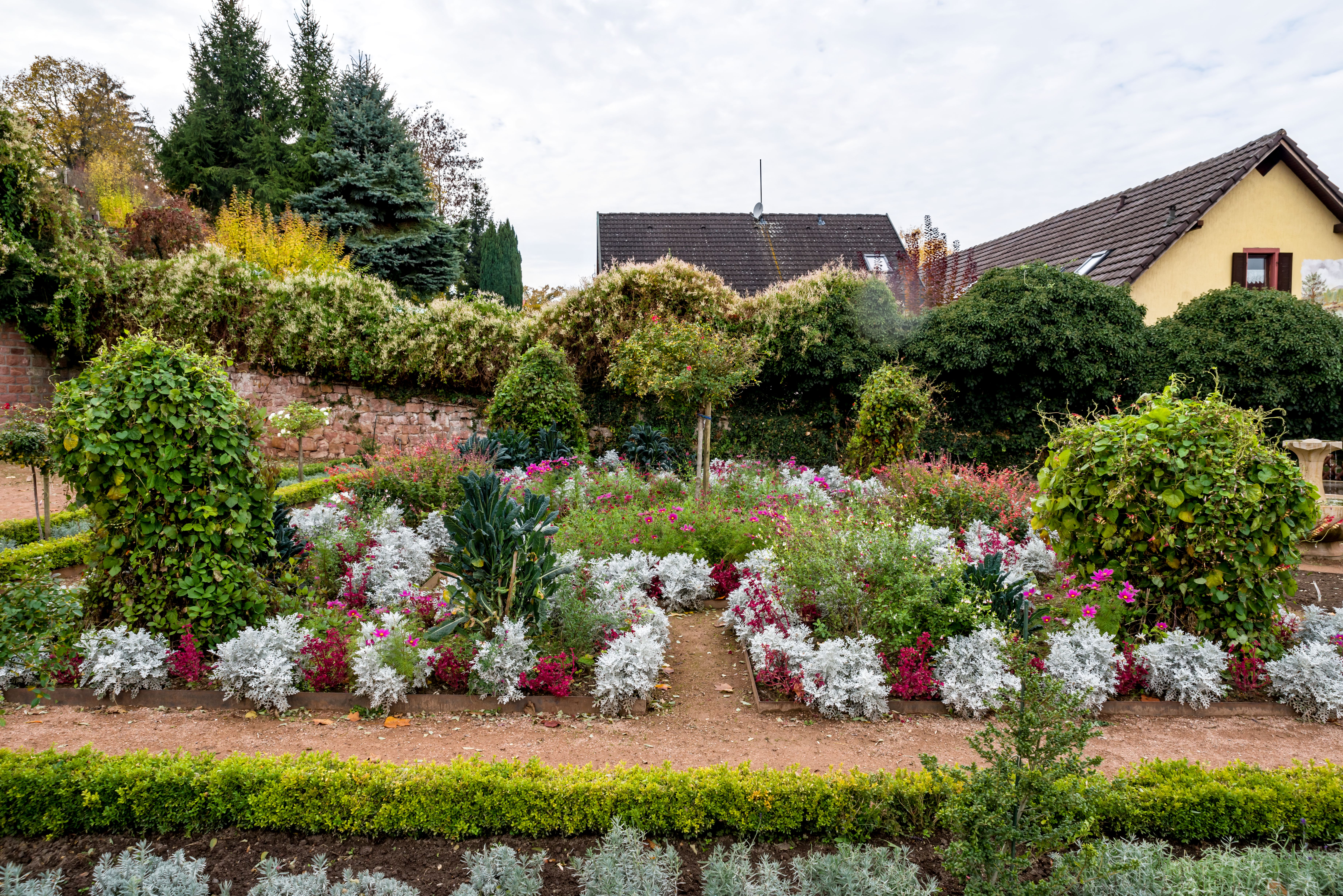 Bilder aus dem Prinzengarten in Ettenheim November